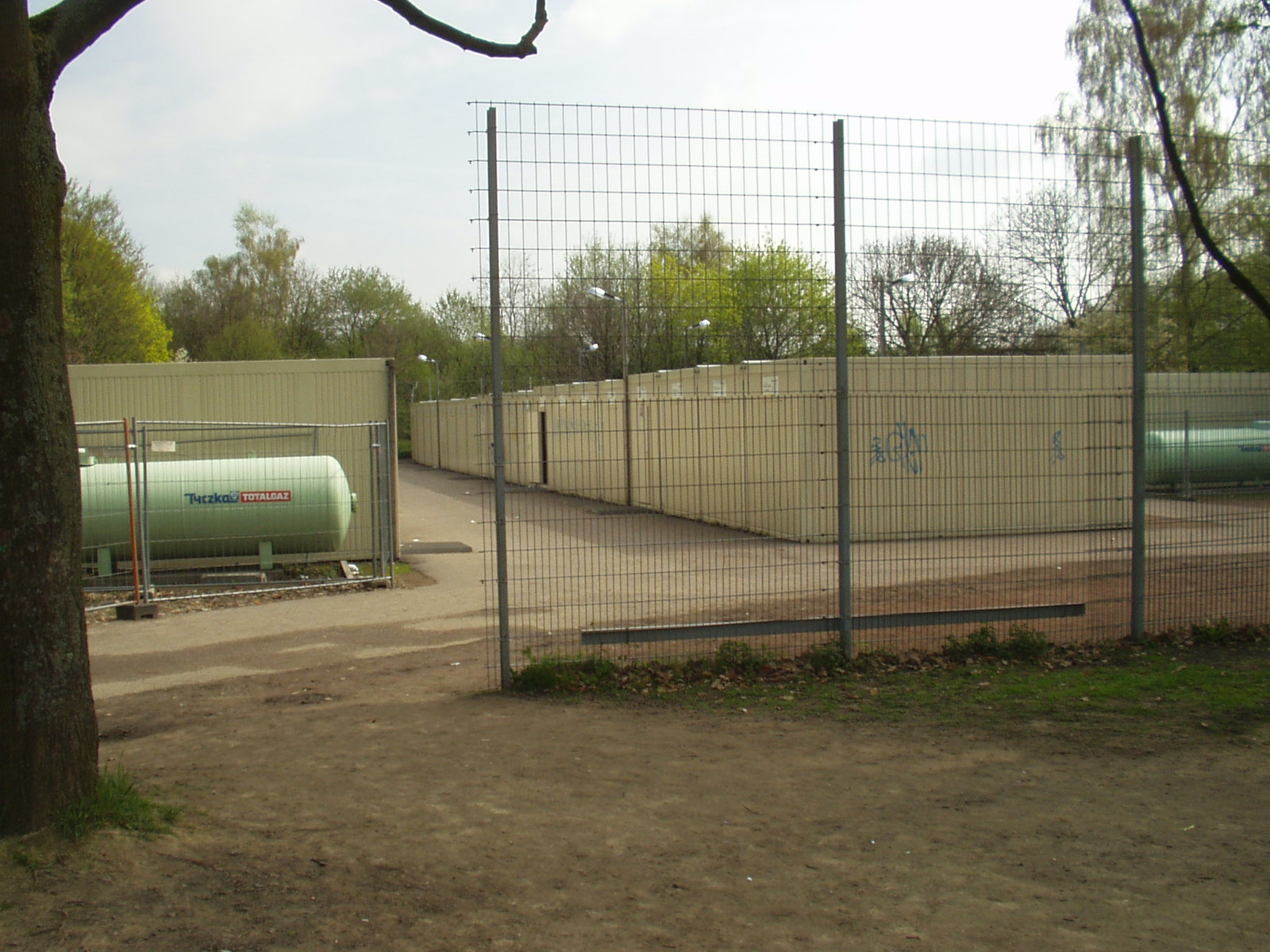 Containerdorf des Bert Brecht Gymnasiums, Dortmund